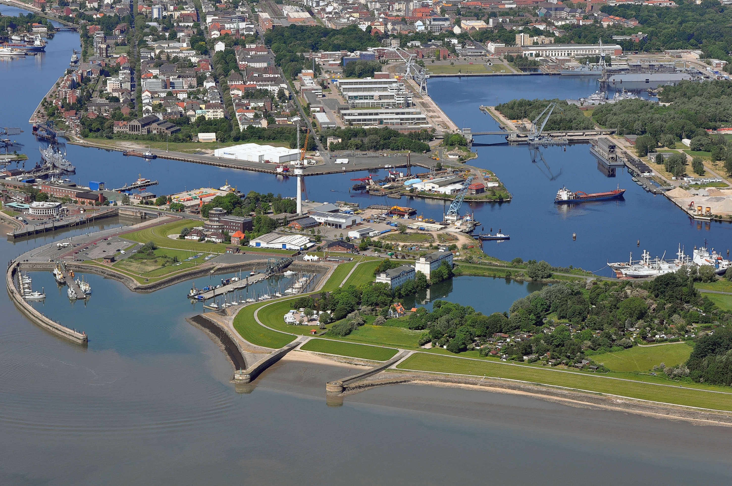 Luftbilder von der Nordseeküste 2012-05